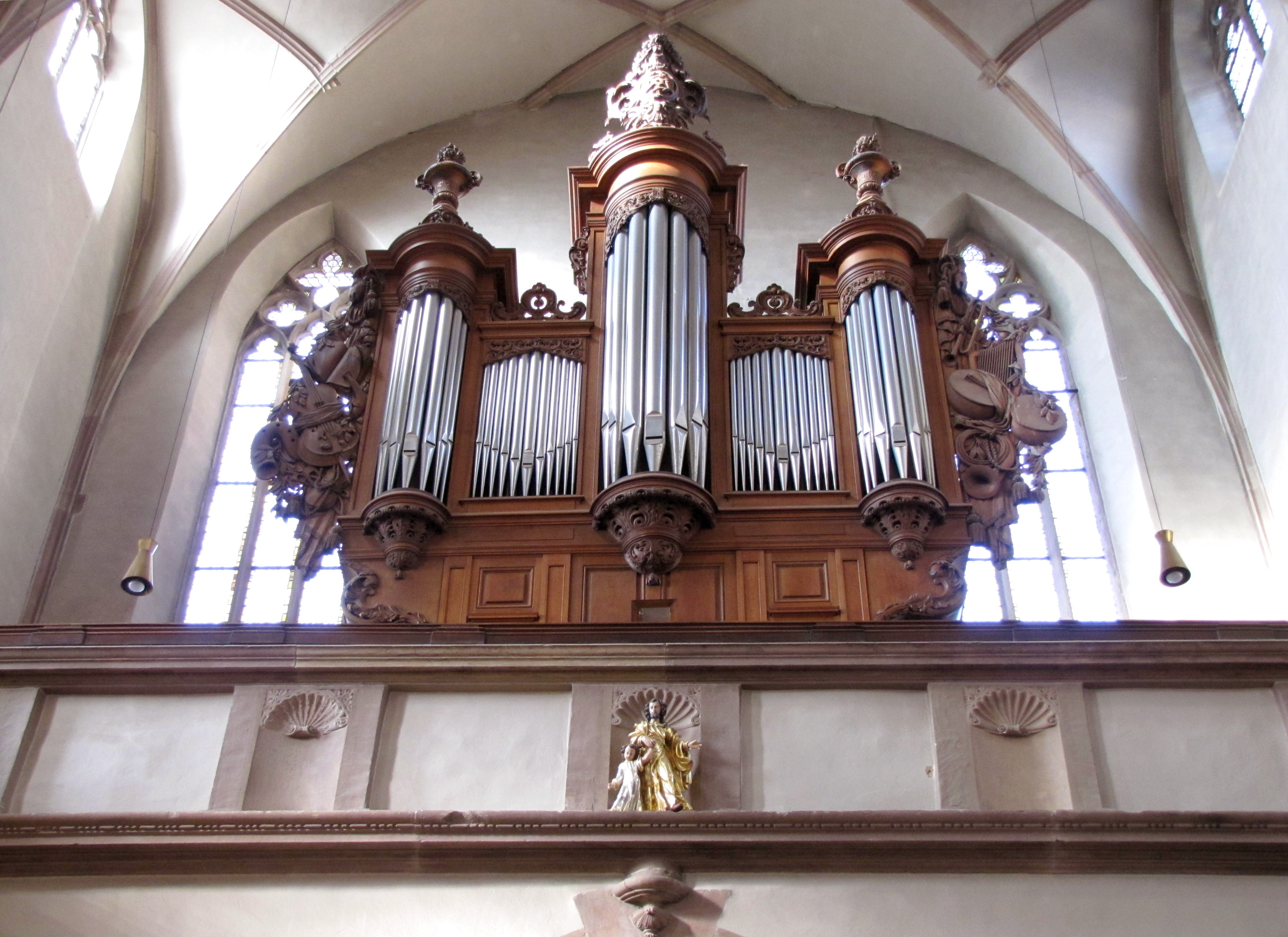 Alsace, Bas-Rhin, Église Saint-Georges de Molsheim, ancienne église des Jésuites (1618) (PA00084798, IA67006097). Orgue de Jean-André Silbermann (1781): This object is classé Monument Historique in the base Palissy, database of the French furniture patrimony of the French ministry of culture, under the references PM67001055 and IM67009693. This object is classé Monument Historique in the base Palissy, database of the French furniture patrimony of the French ministry of culture, under the references buffet PM67000181 buffet and instrument PM67001056 instrument.